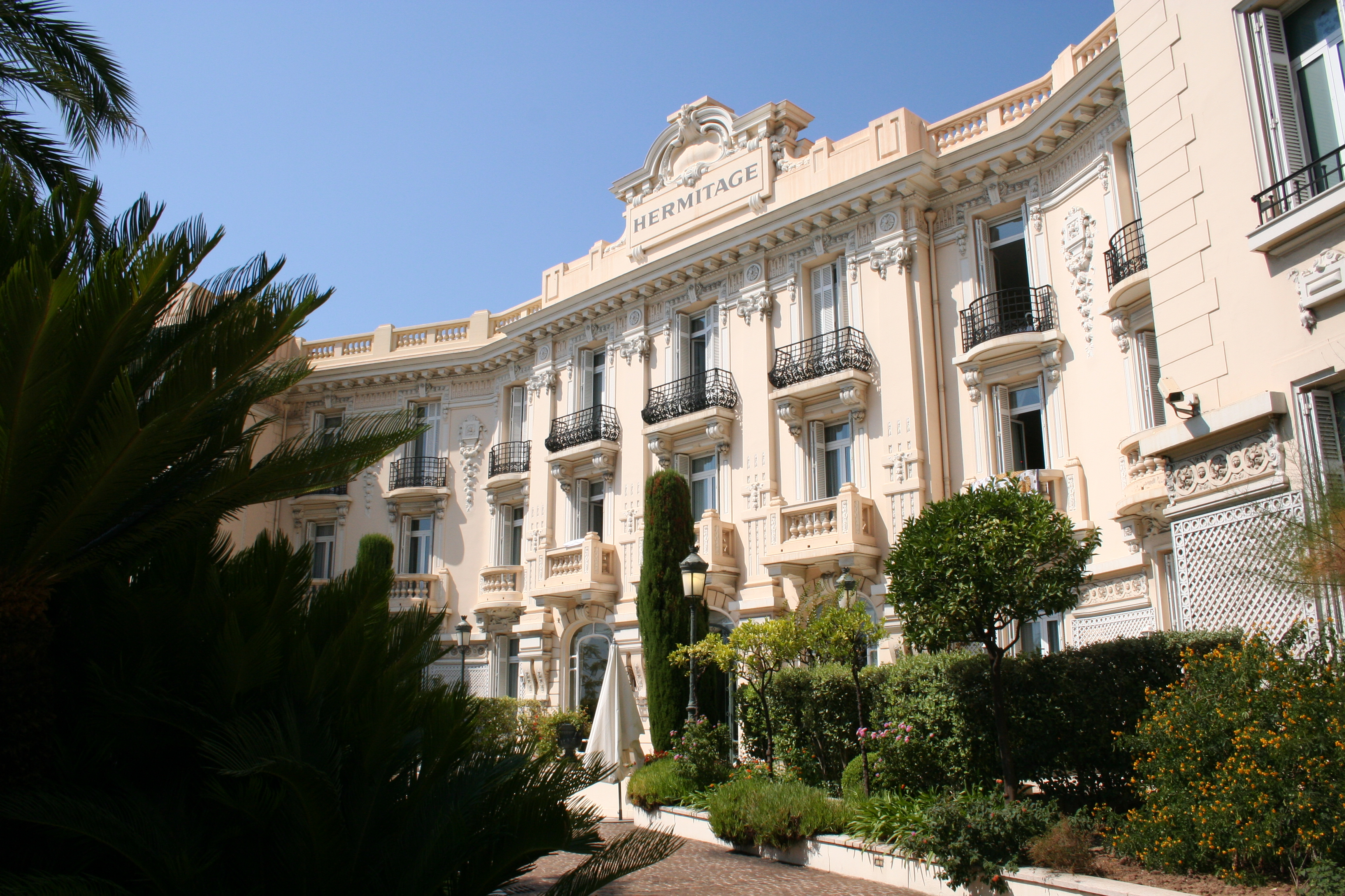 Hermitage hotel, Monte Carlo, Monaco.